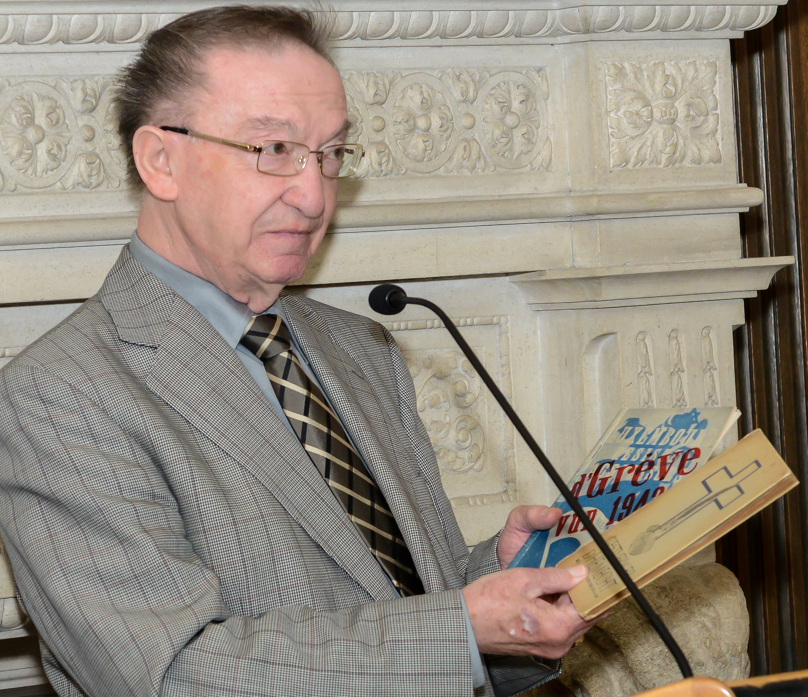 De Roby Zenner bei der Presentatioun vum Buch iwwer de Generalstreik vun 1942, fir dat hien als Koordinator gewierkt huet. Am Kader vun de Feierlechkeete ronderëm de 70. Joeresdag vum Enn vum Zweete Weltkrich an Europa hat de Paul Dostert, Direktor vum Centre de documentation et de recherche sur la Résistance, vum 8. bis den 10 Mee 2015 an d'Villa Pauly invitéiert. Bei geféierte Visite vum Gebäi huet hien ënner anerem d'Aarbechte vun der Fondation nationale de la résistance (FONARES) virgestallt. Den 8. Mee huet d'LPPD hiert Buch iwwer de Generalstreik am August 1942 virgestellt an duerno war de Vernissage duerch de Premier Xavier Bettel vun der Wanderausstellung «Between Shade and Darkness. Le sort des Juifs du Luxembourg de 1940 à 1945», engem Projet fir Schoulen a Gemengen vum Resistenzmusée a MemoShoah Lëtzebuerg. Fir den 9. Mee stoung eng Table ronde mat Zäitzeien um Programm. Den 10. Mee gouf den Evenement mat engem Jazz-Concert vum Duo Michel Reis a Marc Demuth ofgeschloss.